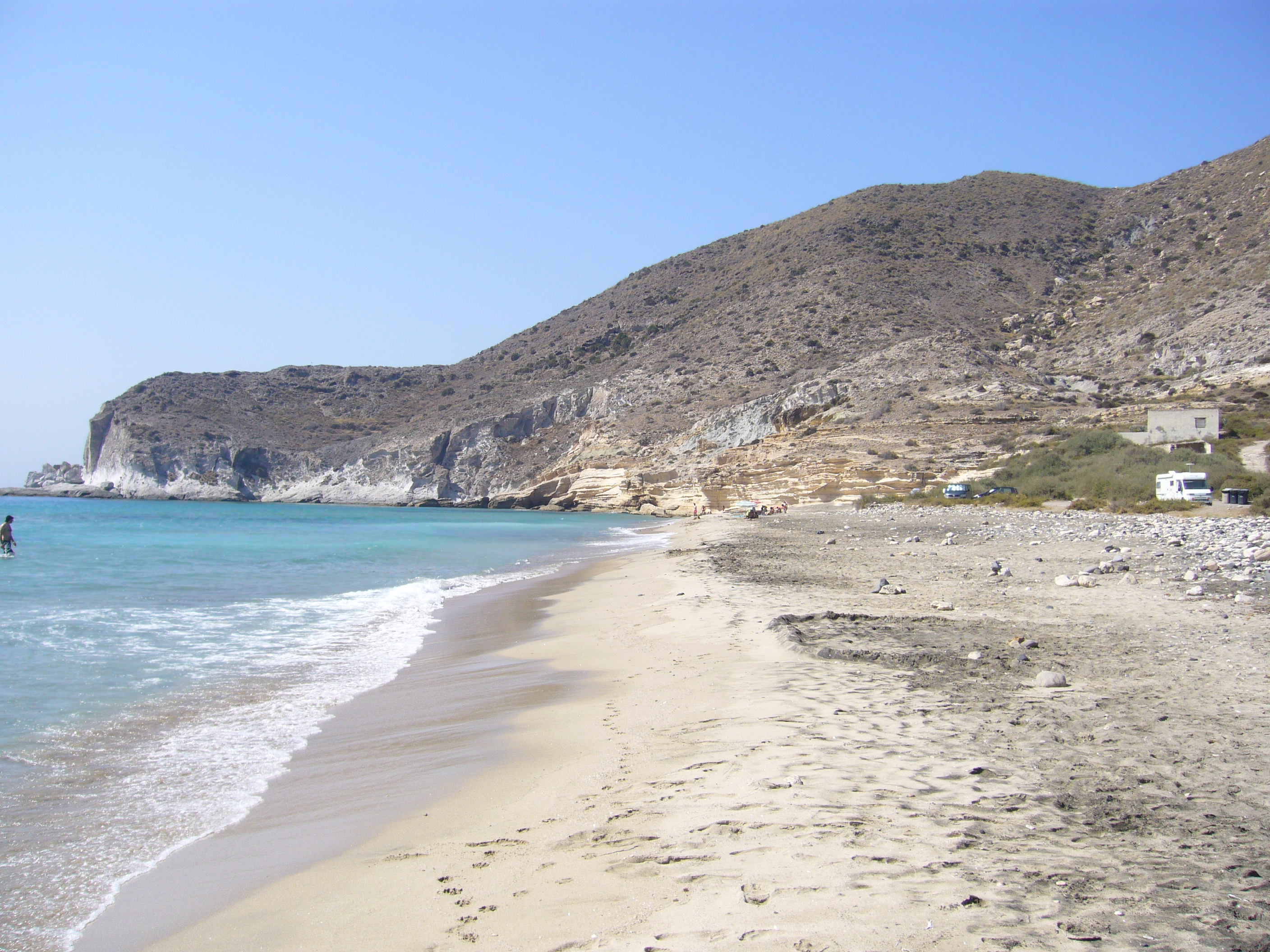 Playa de baja ocupación excepto en Agosto.